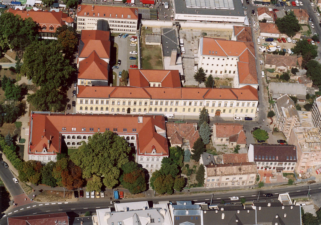 Zalaegerszeg - Zala megye - Hungary